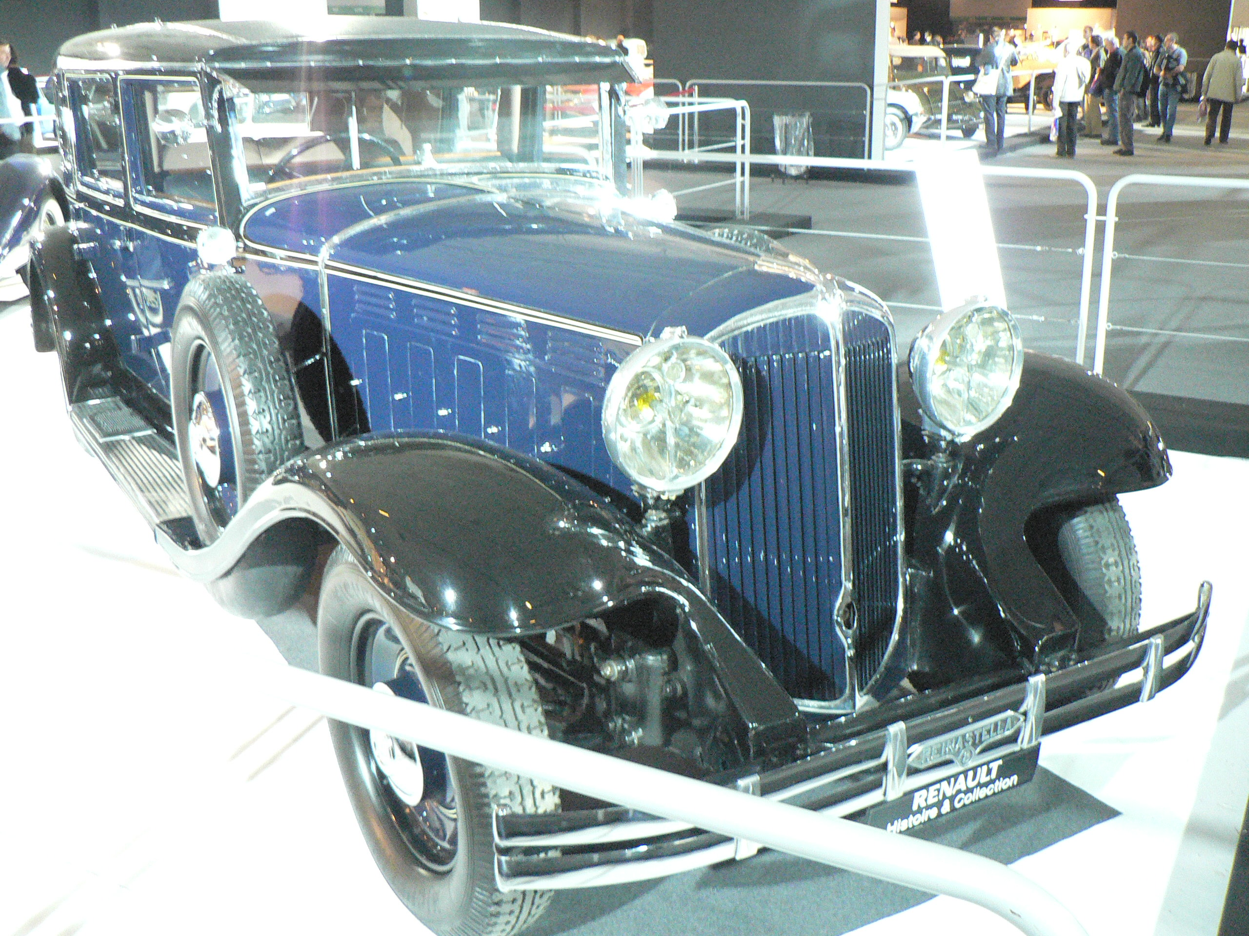 Mondial de l automobile de Paris (October 2006)